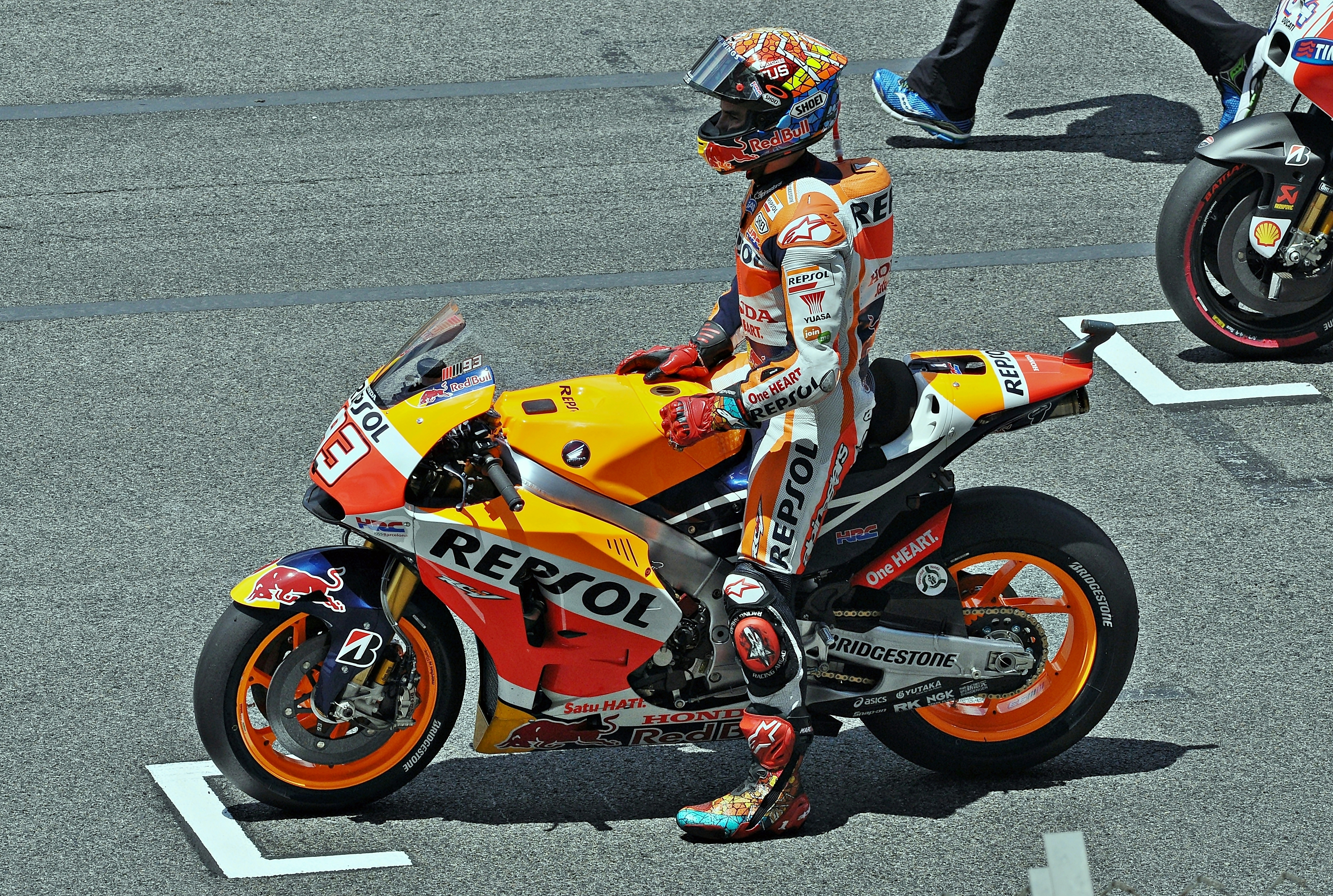 garn premio de cataluña